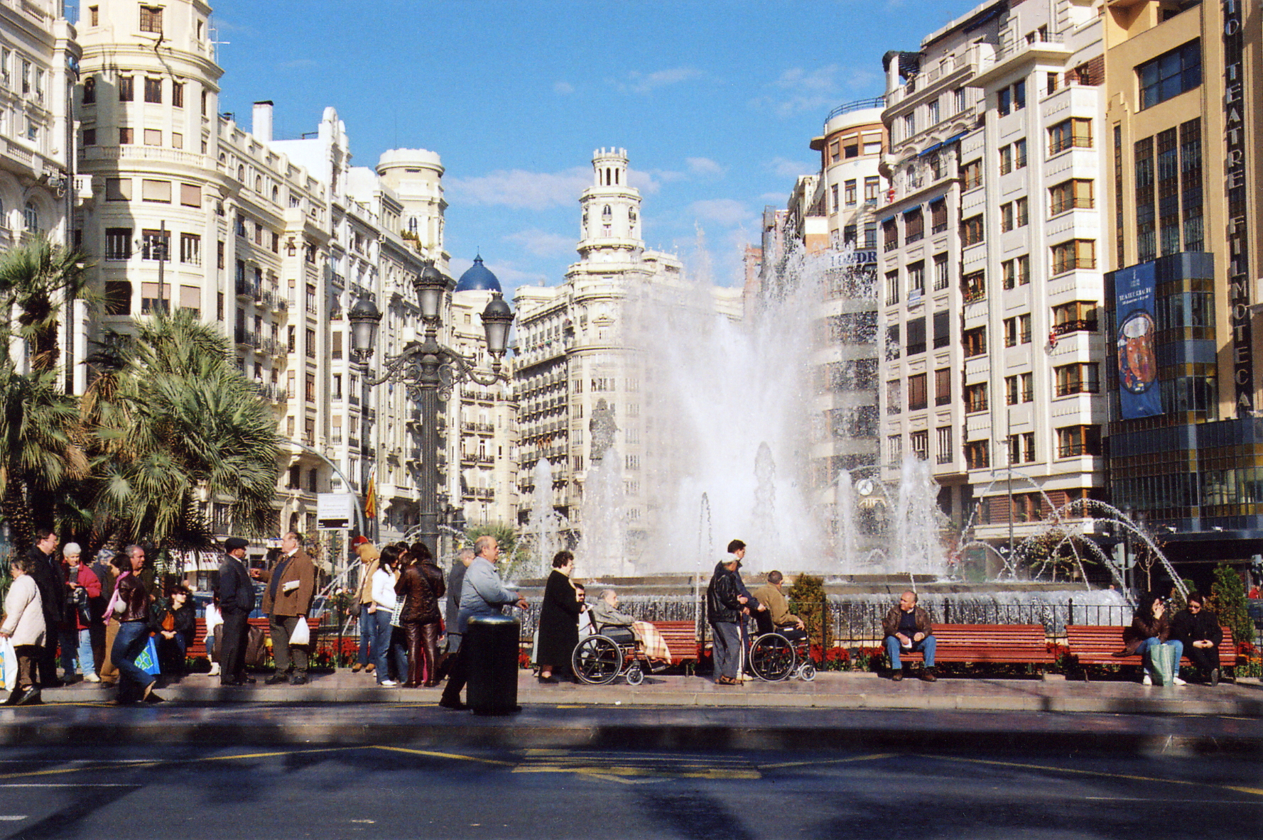 Plaza del Ayuntamiento, Valencia-España